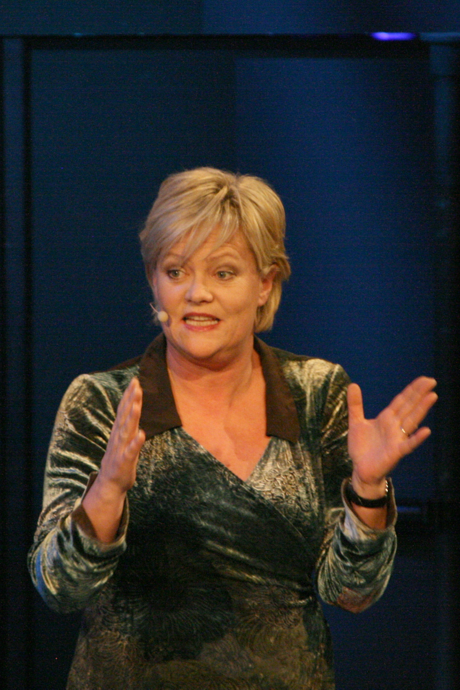 Kristin Halvorsen, SV-politiker. Fra NHOs Årskonferanse 2009.